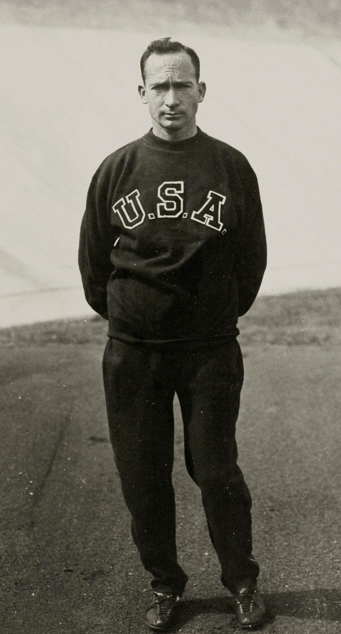 Sport. Olympische Spelen 1928 Amsterdam, Nederland : De Amerikaanse hardloper Jackson Scholz, kanshebber op de 200 meter hardlopen, hier in trainingspak.